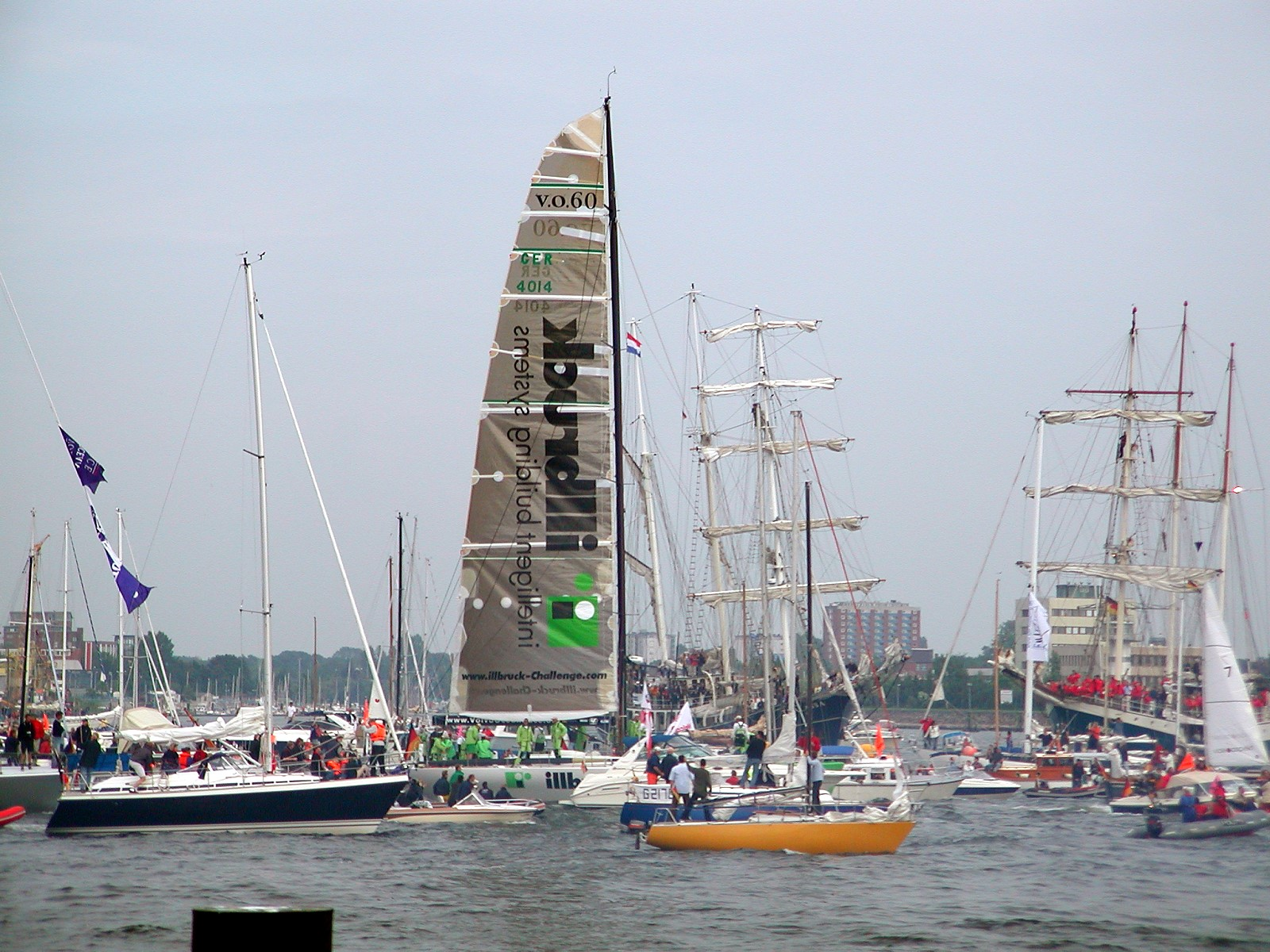 Volvo Ocean Race 2001/2002: Zieleinlauf des Gesamtsiegers illbruck in Kiel.